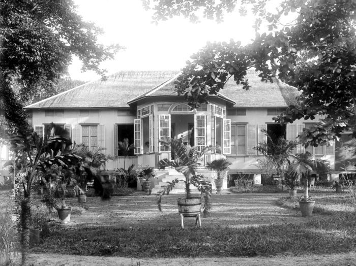 Negatief. Administrateurswoning van de Billiton Maatschappij te Manggar